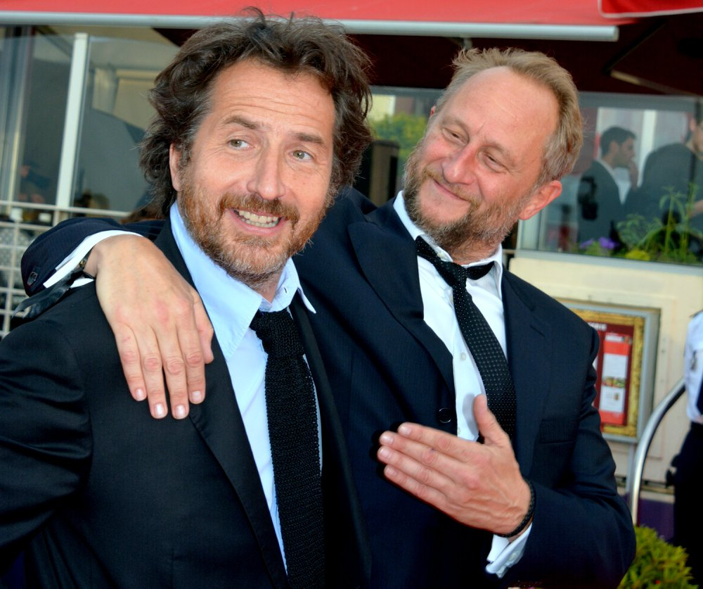 Édouard Baer et Benoît Poelvoorde au festival de Cabourg